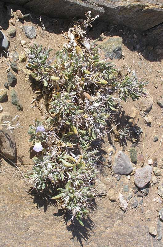 Blepharis mitrata at Klein Aus, Namibia August 2007